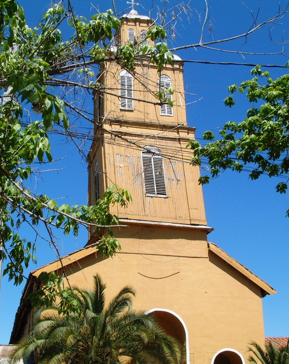 Iglesia de Coinco